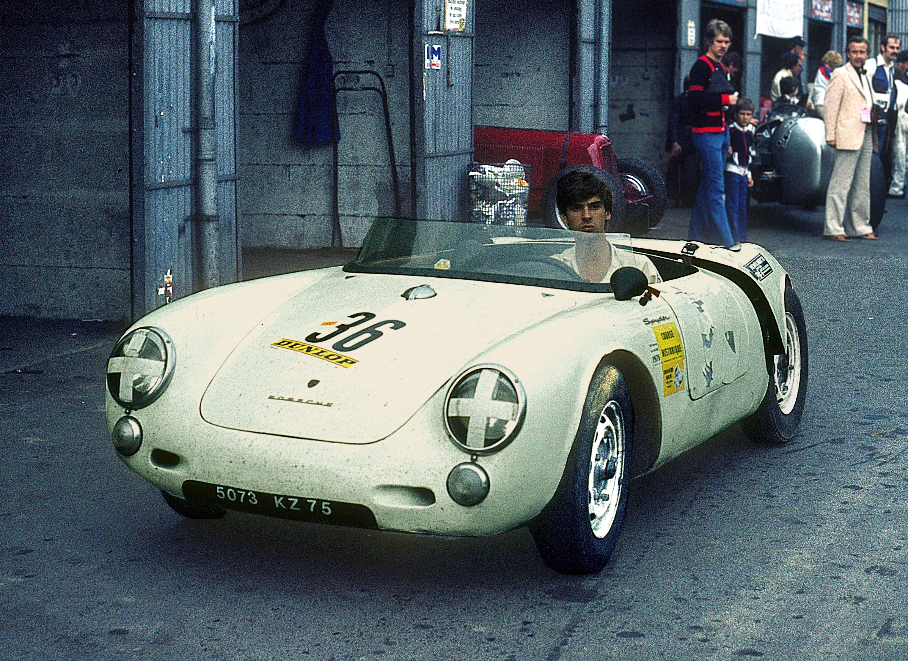 Porsche 550 A – 1500 RS, Baujahr 1957 (Motorhaube nicht ganz geschlossen) beim Oldtimer-GP des AvD im Fahrerlager des Nürburgrings